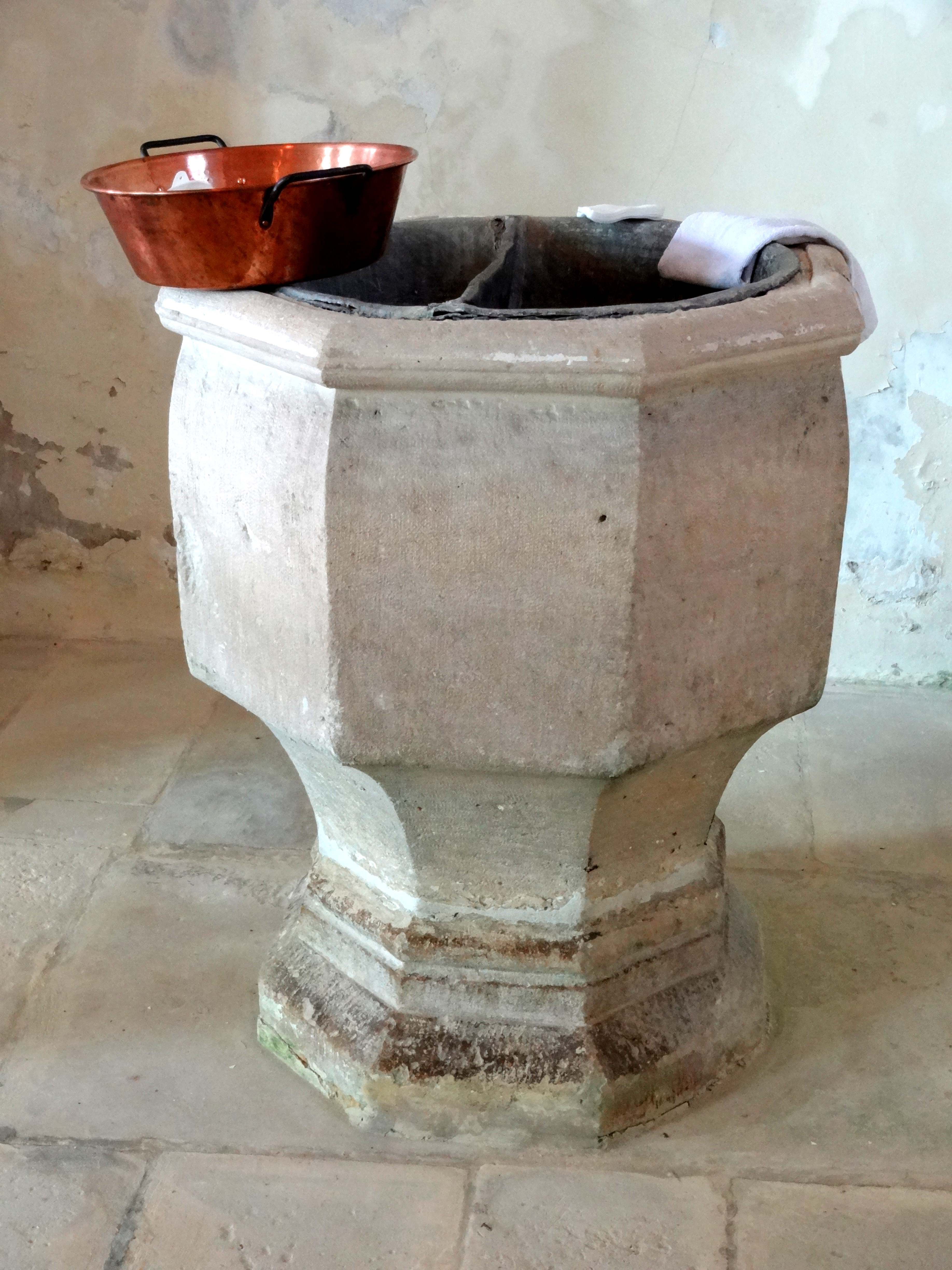 Mobilier de l'église - voir titre.